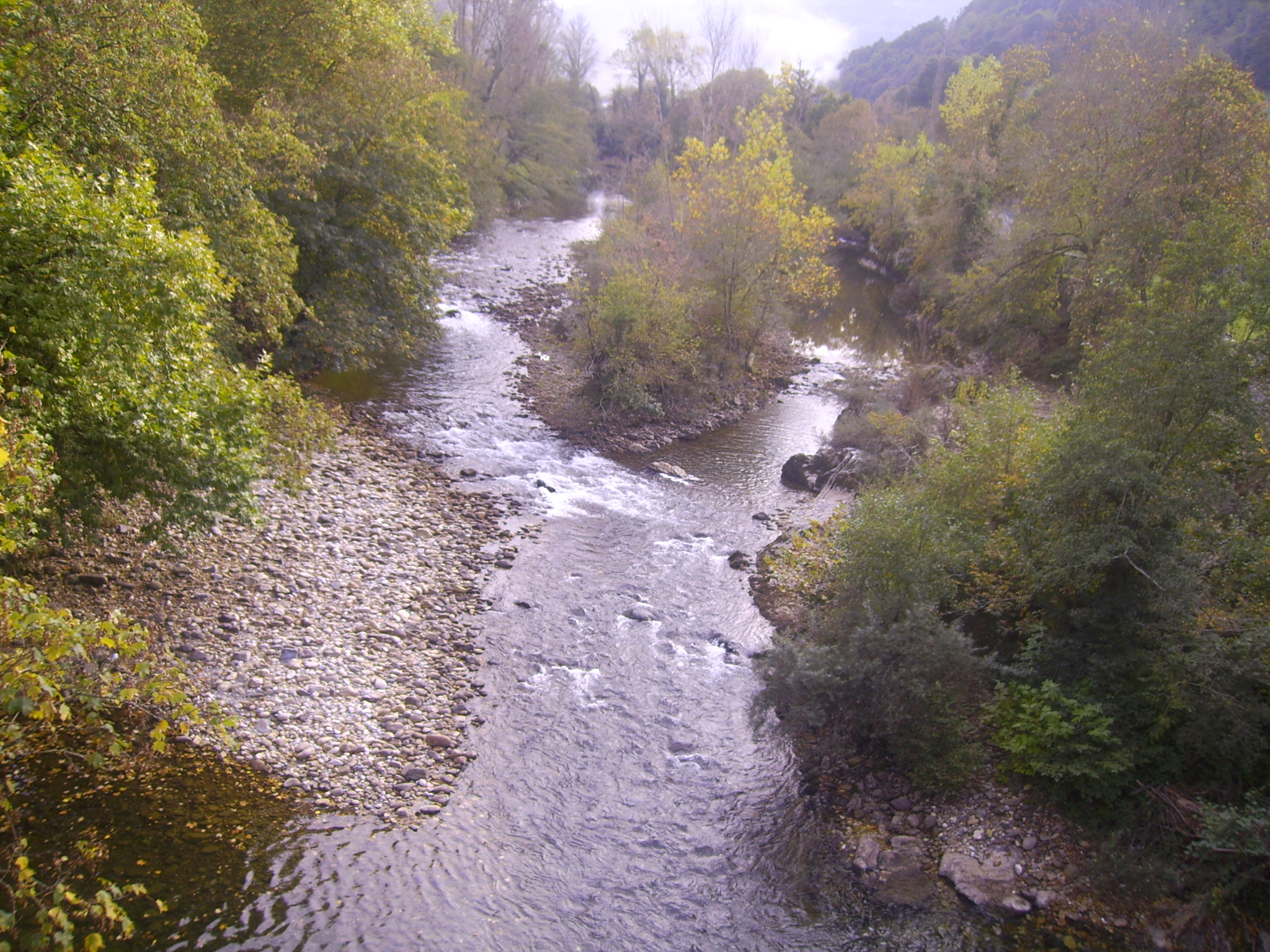 Fotografía tomada desde el puente romano de Cangas de Onís al Río Sella, Asturias,España.